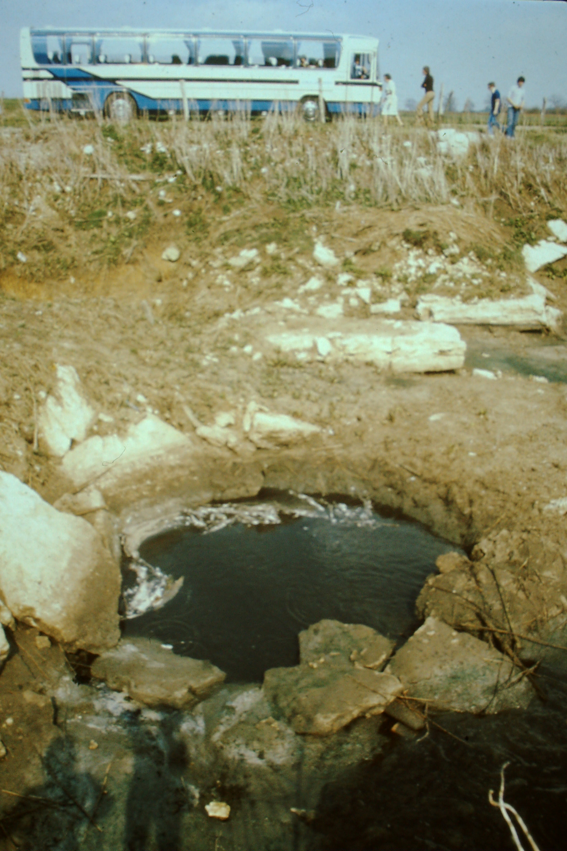 Visite d'élus sur le terrain